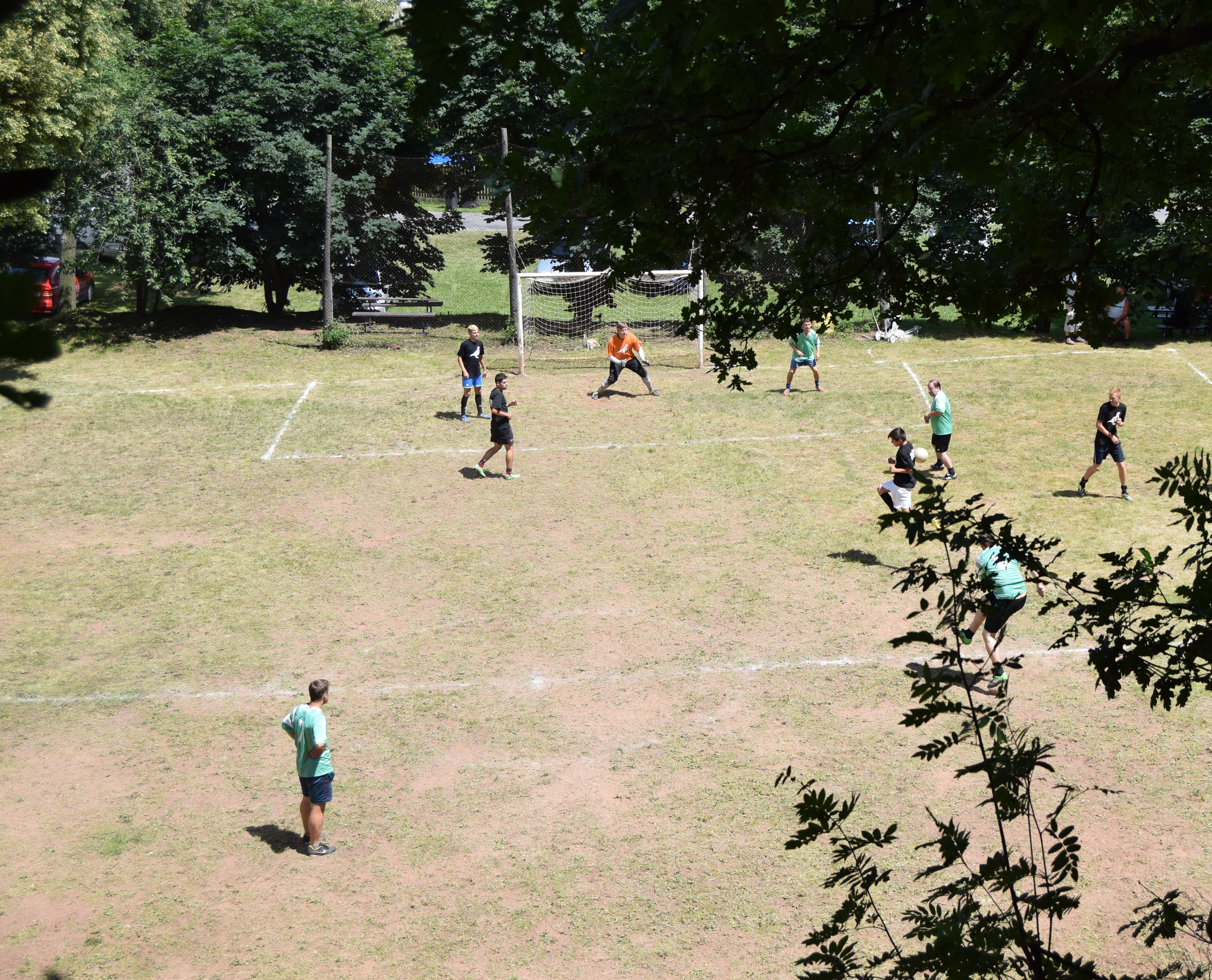 Hřiště "Pod Skalou" - Kunčina